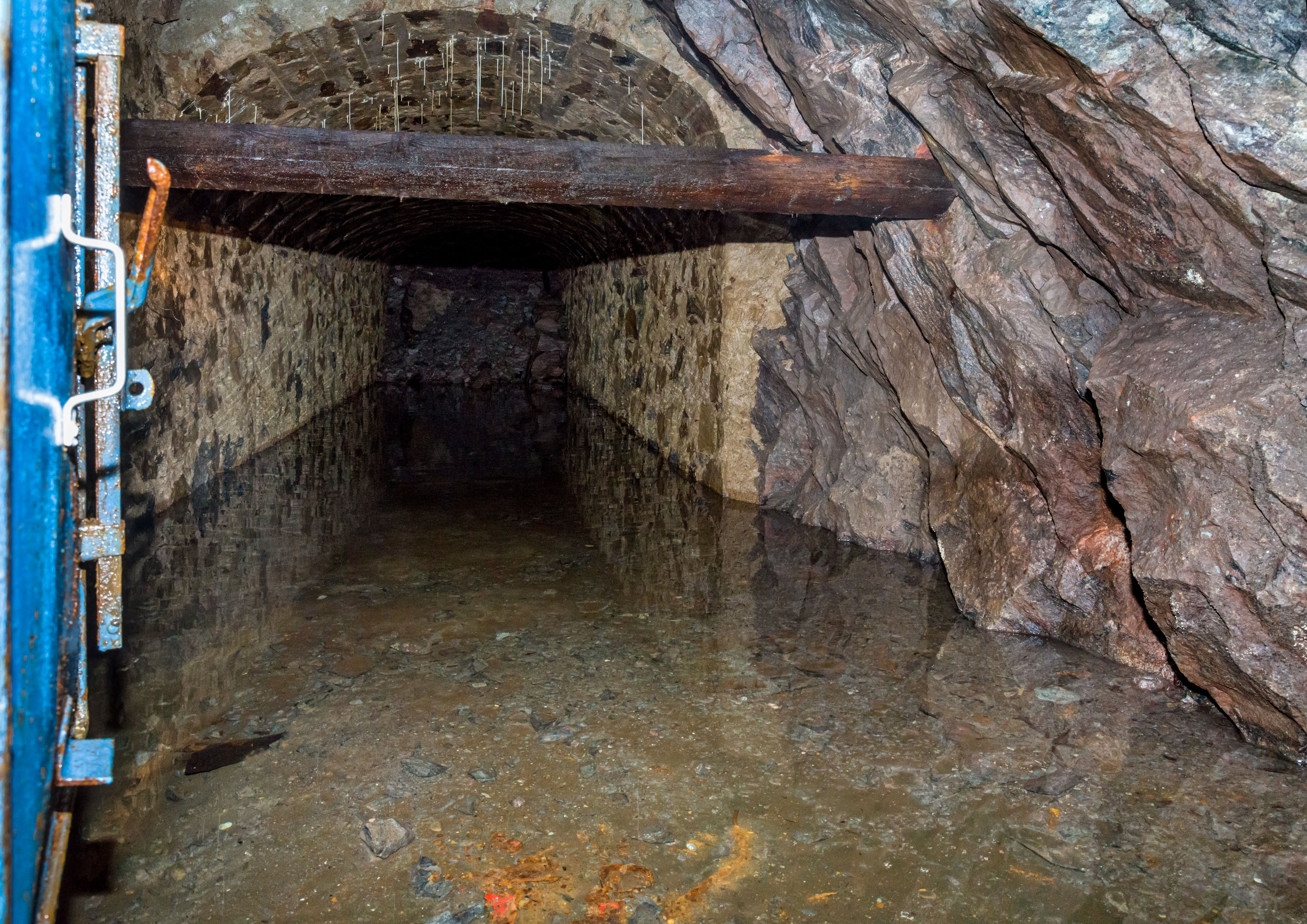 Die Einlagerung der Dokumente zum Grundgesetz und des Originals des "Grundgesetzes für die Bundesrepublik Deutschland" als Microfilm am 03. Oktober 2016. Das Grundgesetz ist das 1.000.000.000 Dokument (Bild) welches eingelagert wurde. Wassersammelbecken am Stollenende, es werden ca 20 l/sec hier gesammelt und über die Rohrleitung abgeführt. Das Wasser wird zu einem ortlichen Wasserkraftwerk geleitet